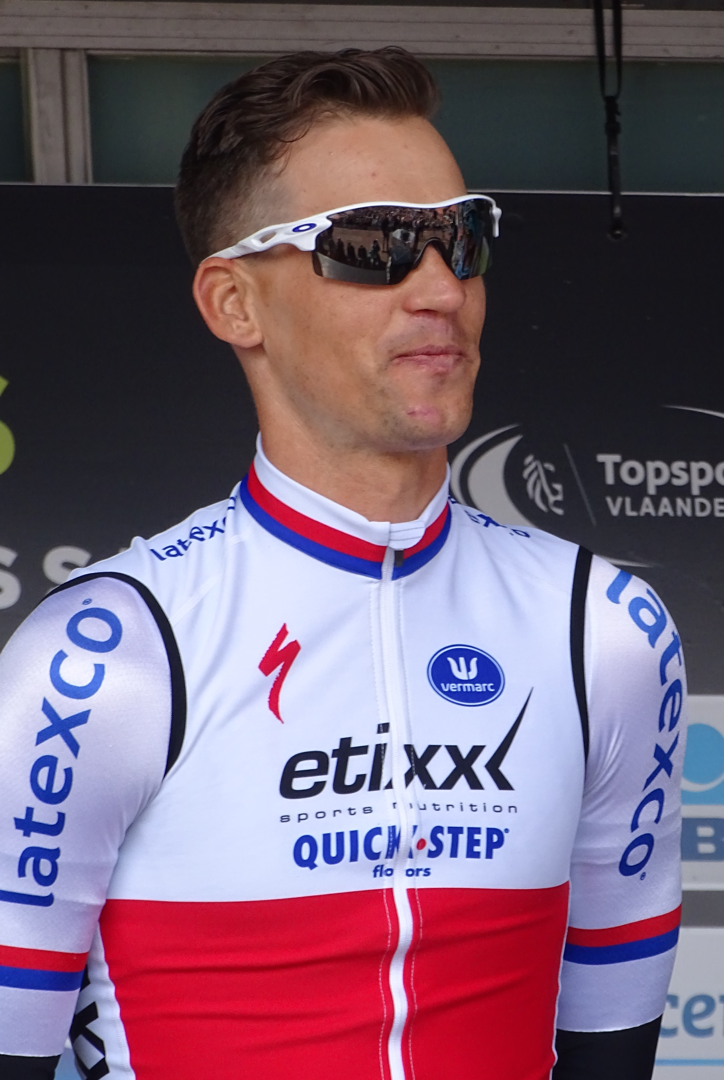 Reportage réalisé le mercredi 8 avril à l'occasion du départ du Grand Prix de l'Escaut 2015 à Anvers, Belgique.